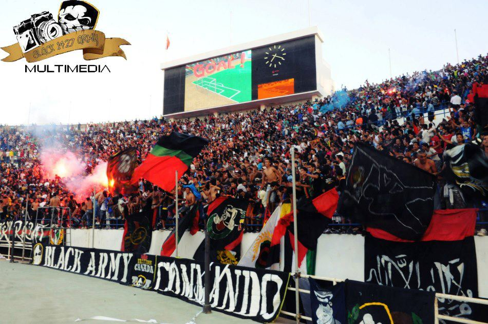 la curva ché